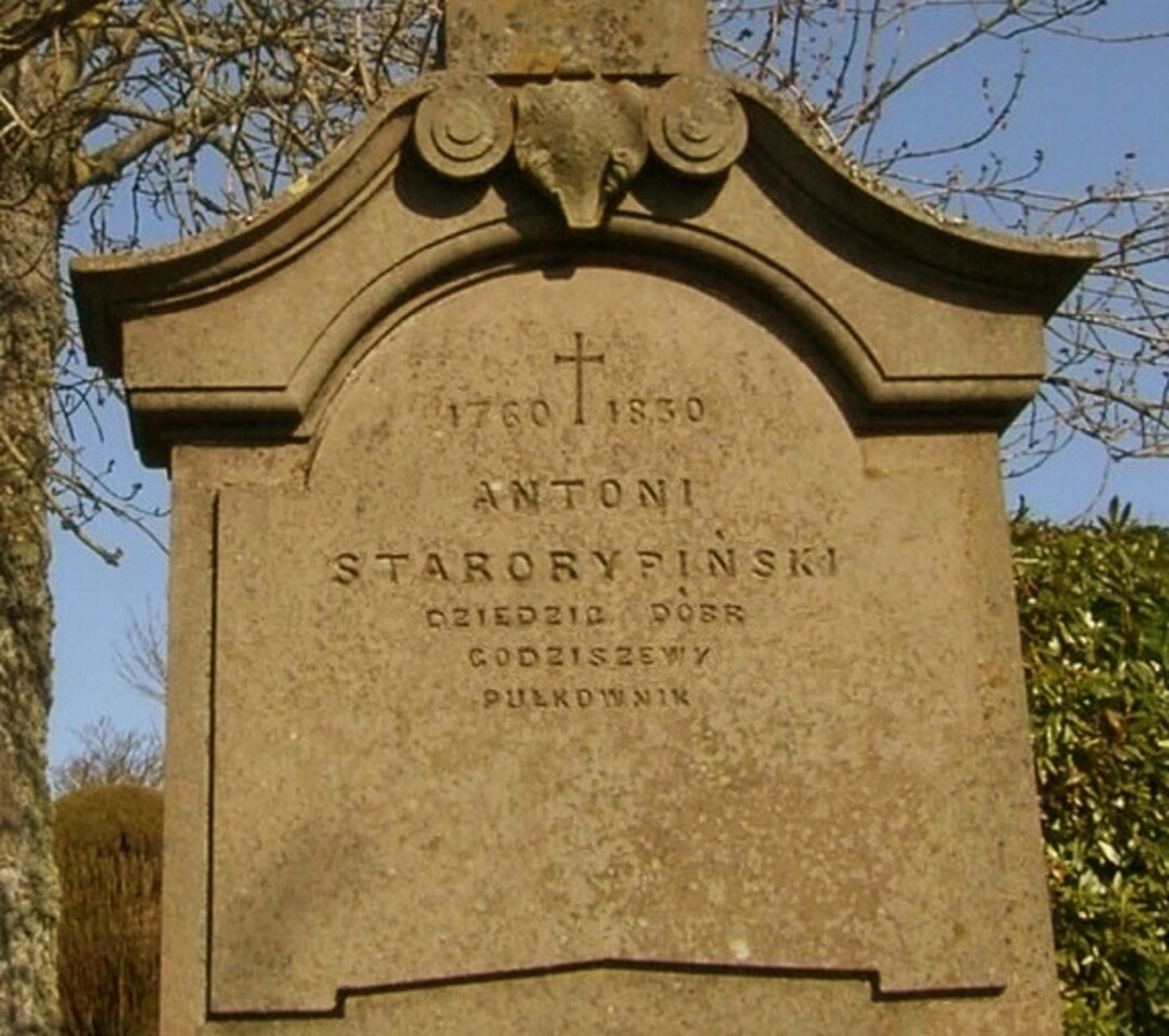 Antoni Starorypiński h. Nałęcz (1760-1830). Dziedzic dóbr Godziszewy. Pułkownik wojsk Księstwa Warszawskiego (1813 r.). Podpułkownik i dowódca 2. Batalionu w 3. Pułku Piechoty Księstwa Warszawskiego (1810 r.). Uczestnik powstania listopadowego. Zginął w Warszawie tuż przed Bożym Narodzeniem roku 1830. Nagrobek z piaskowca w stylu klasycystycznym z napisem: "Antoni Starorypiński (1760-1830), dziedzic dóbr Godziszewy, Pułkownik".